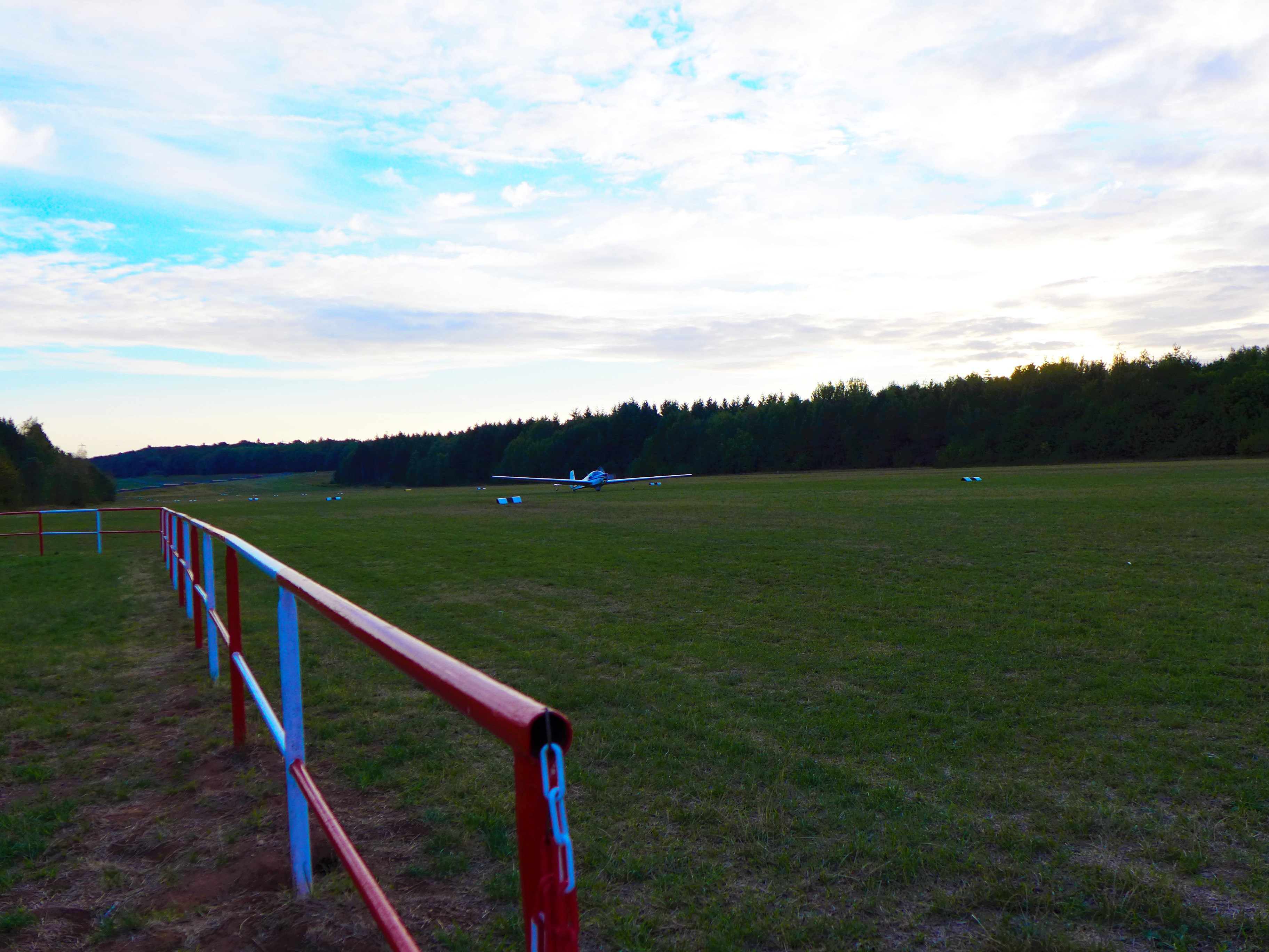 Diefflen, Segelflugplatz, Flugzeug im Landeprozess